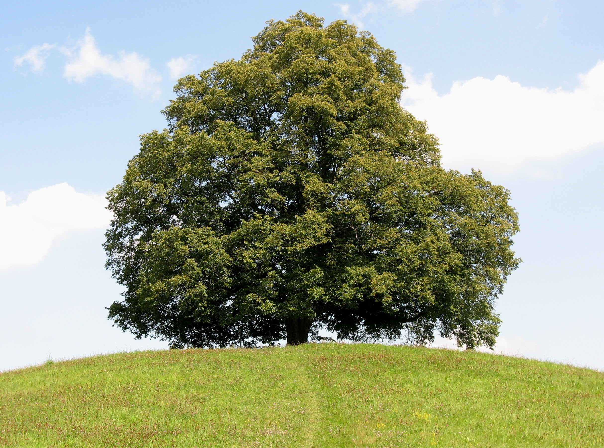 Friedenslinde von Bronnweiler. Die Linde wurde 1871 nach dem Deutsch-Französischen Krieg gepflanzt als "Siegeslinde", später jedoch umbenannt zu "Friedenslinde".